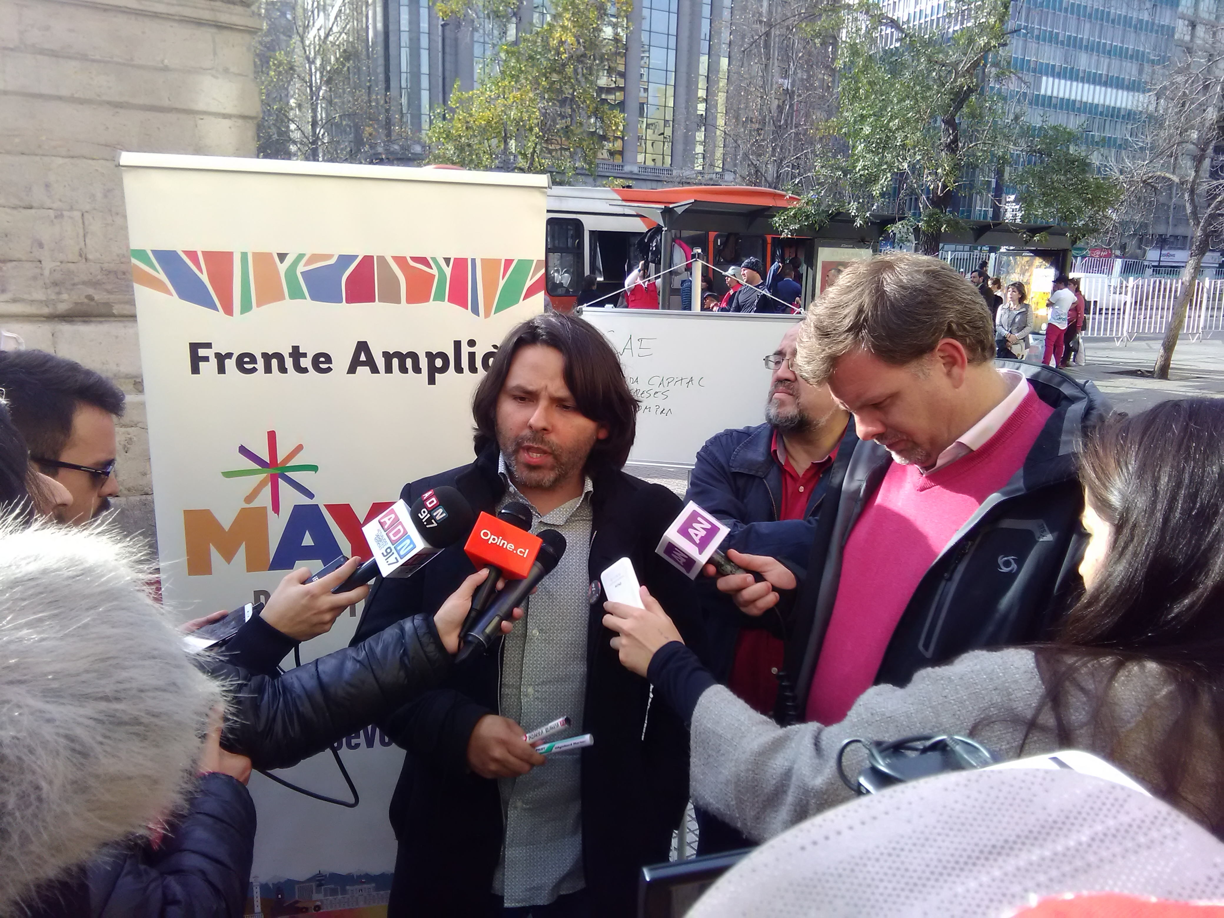 El sociólogo y político chileno Alberto Mayol responde preguntas de la prensa luego de una actividad de campaña, en el marco de su precandidatura presidencial.